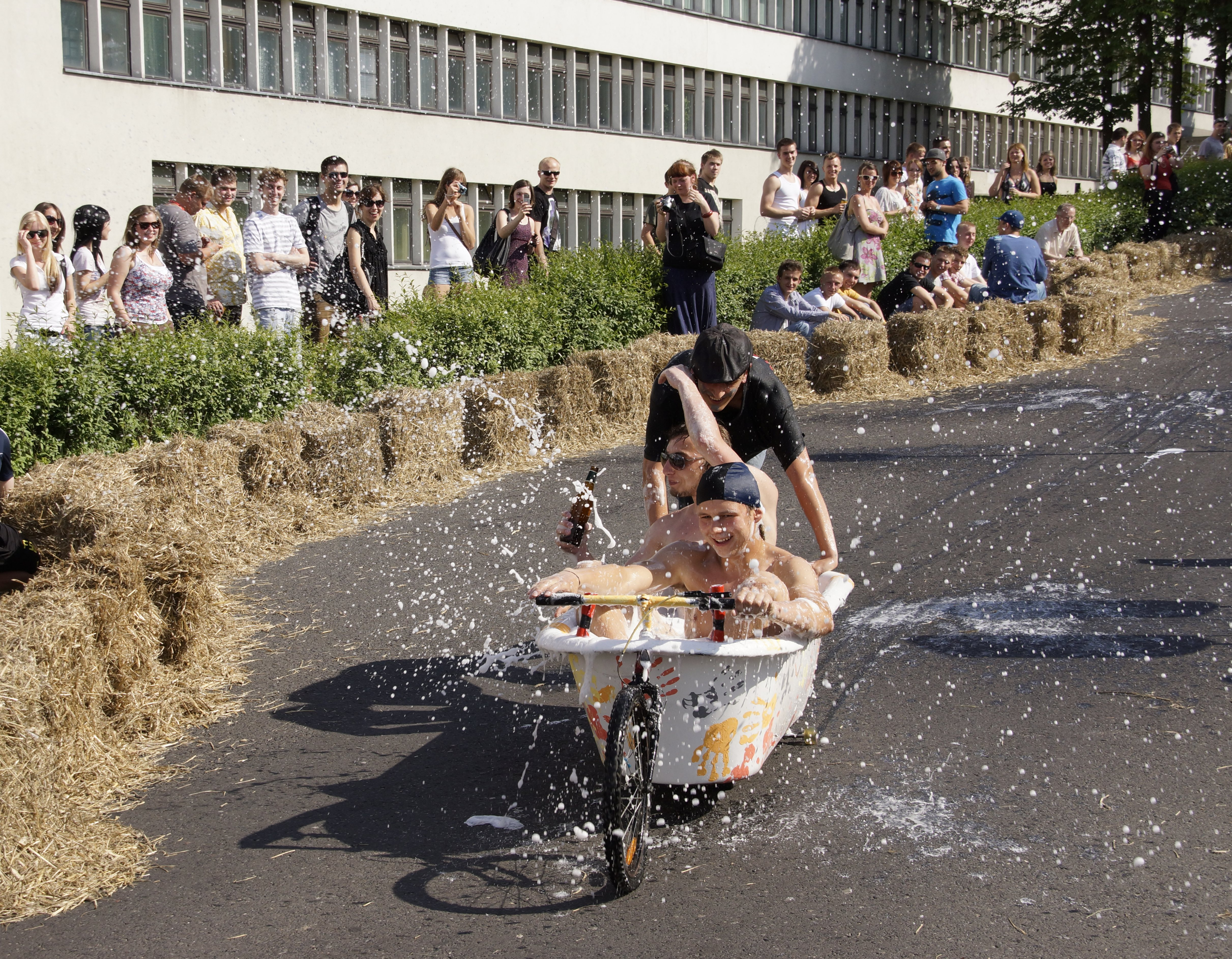 "Zjazd na Byle Czym" w ramach Bachanaliów na Uniwersytecie Zielonogórskim